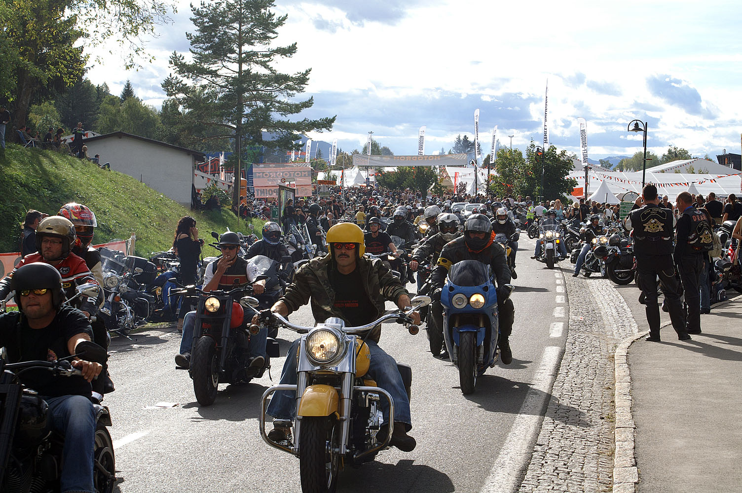 Harley-Davidson European Bike Week at Faak am See, Austria